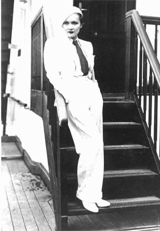 Marlene Dietrich, die bekannte Filmschauspielerin, welche sich augenblicklich in Paris aufhält, wurde von dem Polizeipräfekten von Paris, Chiappe, unter Androhung der Verhaftung, verboten sich öffentlich in Männerkleidern zu zeigen! Marlene Dietrich bei ihrer Ankunft in Europa in Männerkleidern. Information added by Wikimedia users.depicted person: Marlene Dietrich (age: 31)